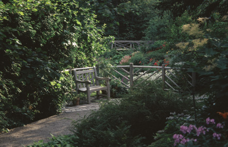 Jardin de Métis – Gaspésie (Québec, Canada)